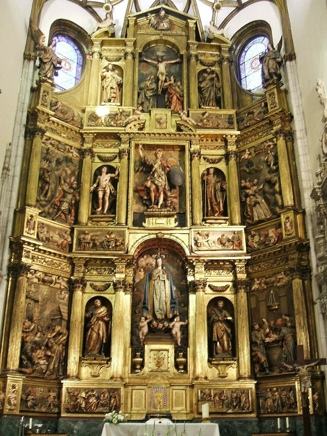 Retablo mayor de la iglesia de San Miguel Arcángel de Vitoria-Gasteiz, obra de Gregorio Fernández, siglo XVII